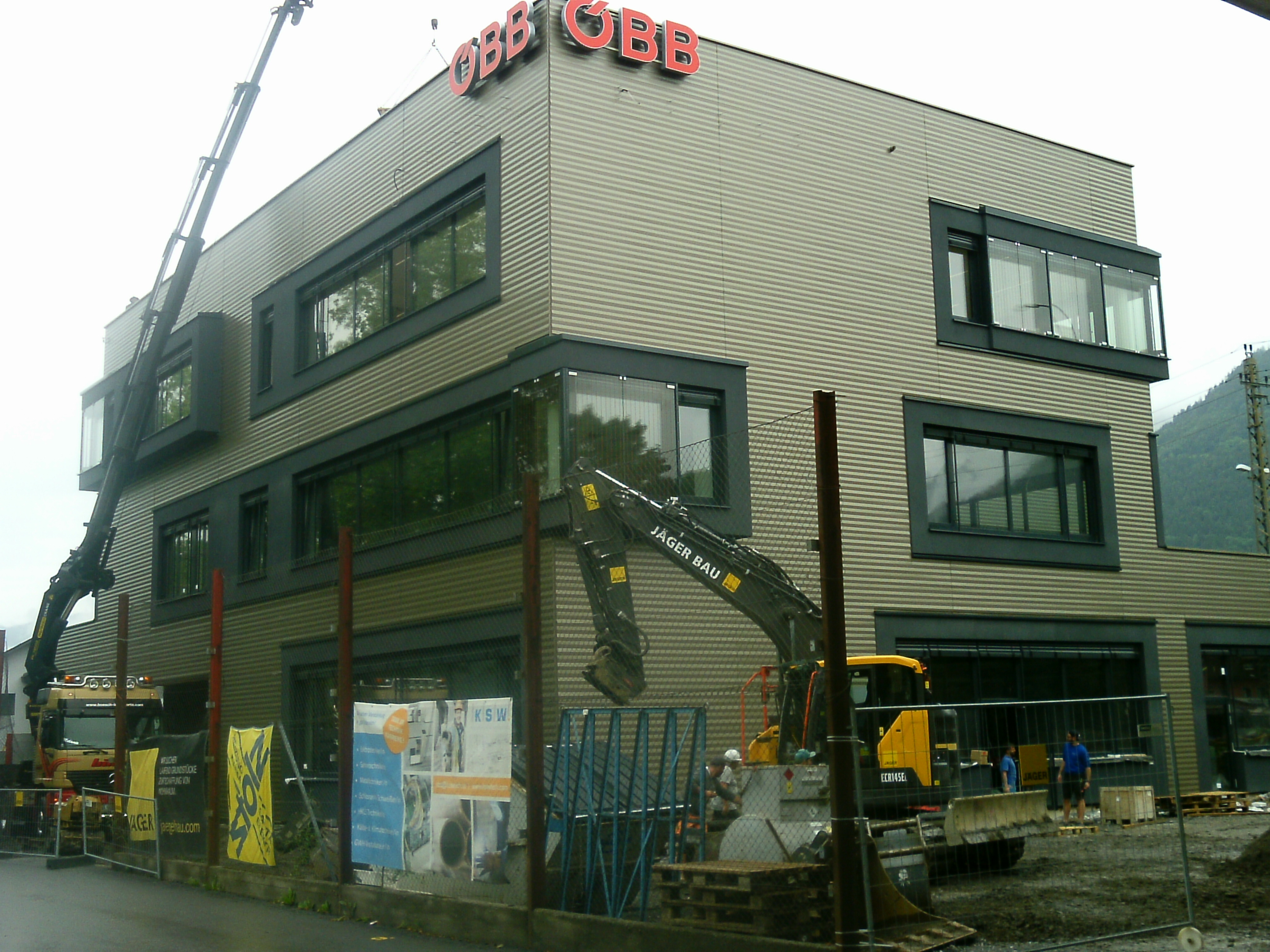 Die neue ÖBB-Lehrwerkstatt im Juni 2020 kurz vor der Fertigstellung